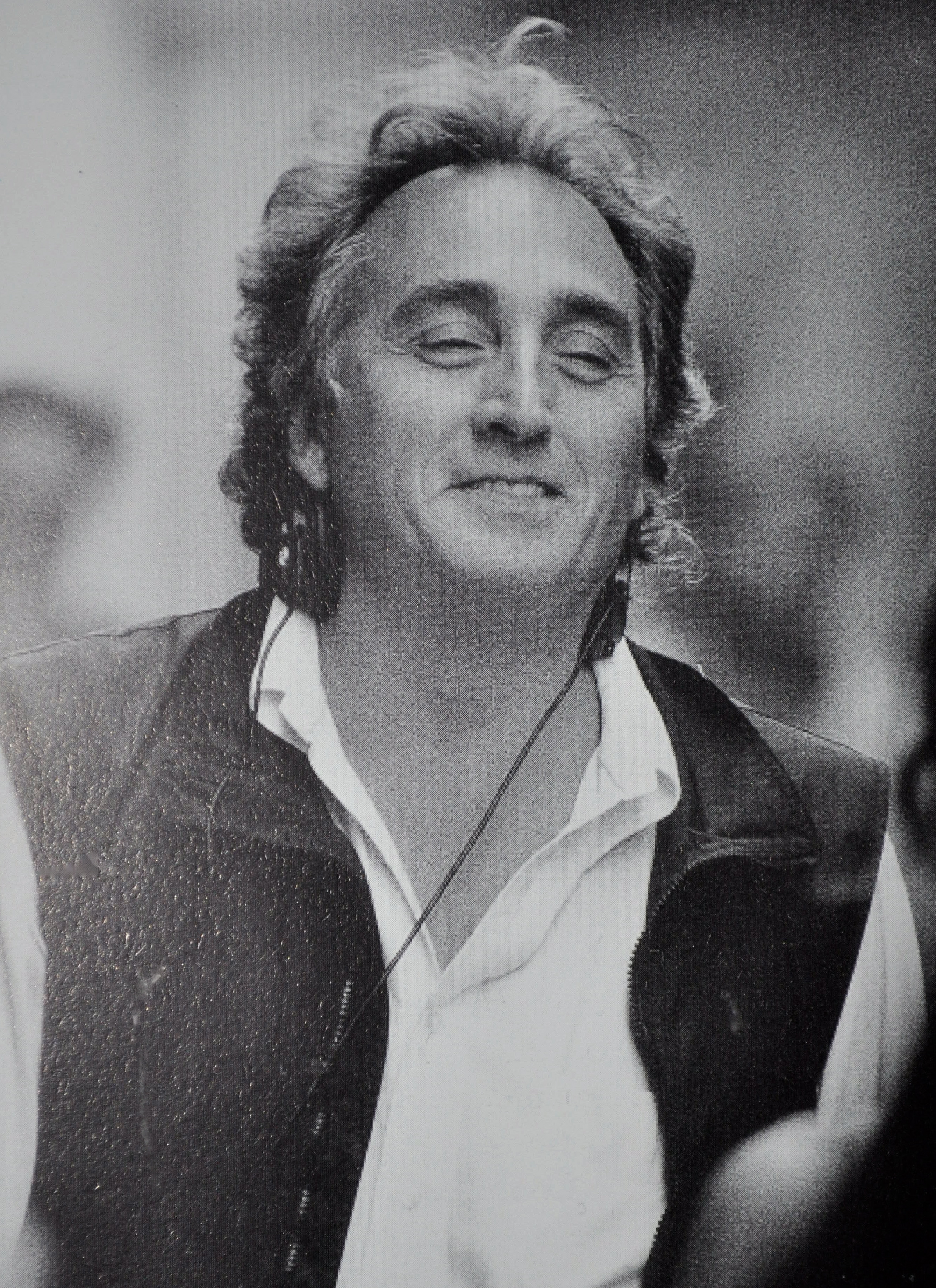 Vincenzo Verdecchi regista